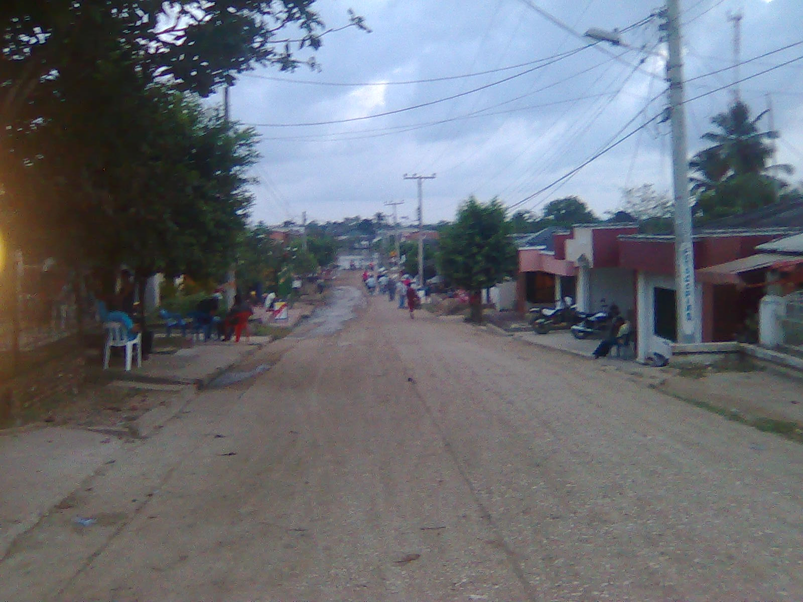 Ubicación: MANATI, ATLÁNTICO